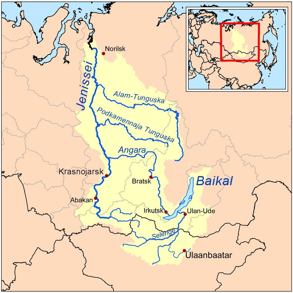 Jenissei